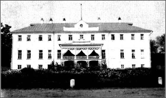 Усадебный дом в Рай-Семеновском